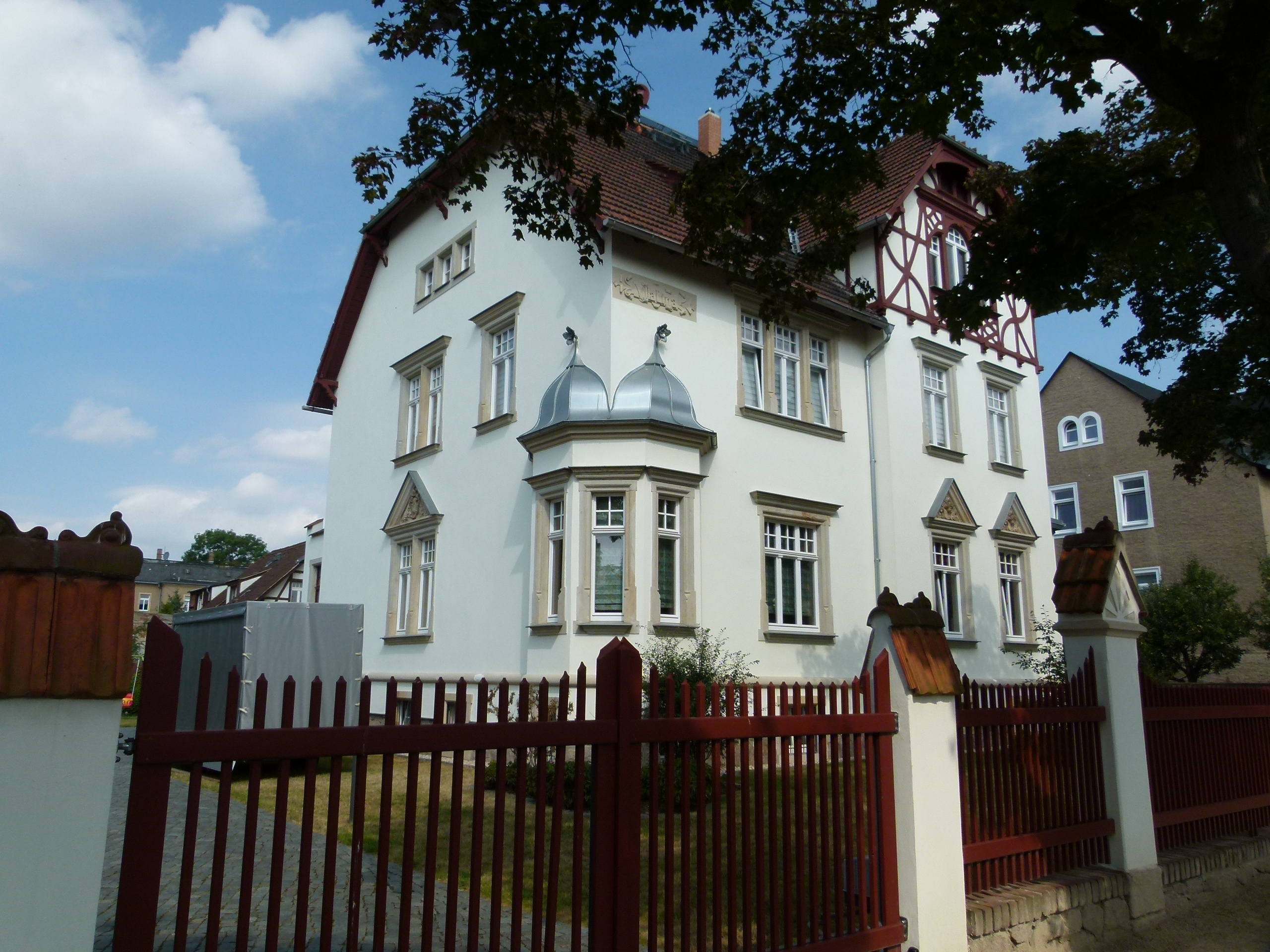 Denkmalgeschütztes Haus, Horst-Viedt-Straße 3, Radebeul, Sachsen